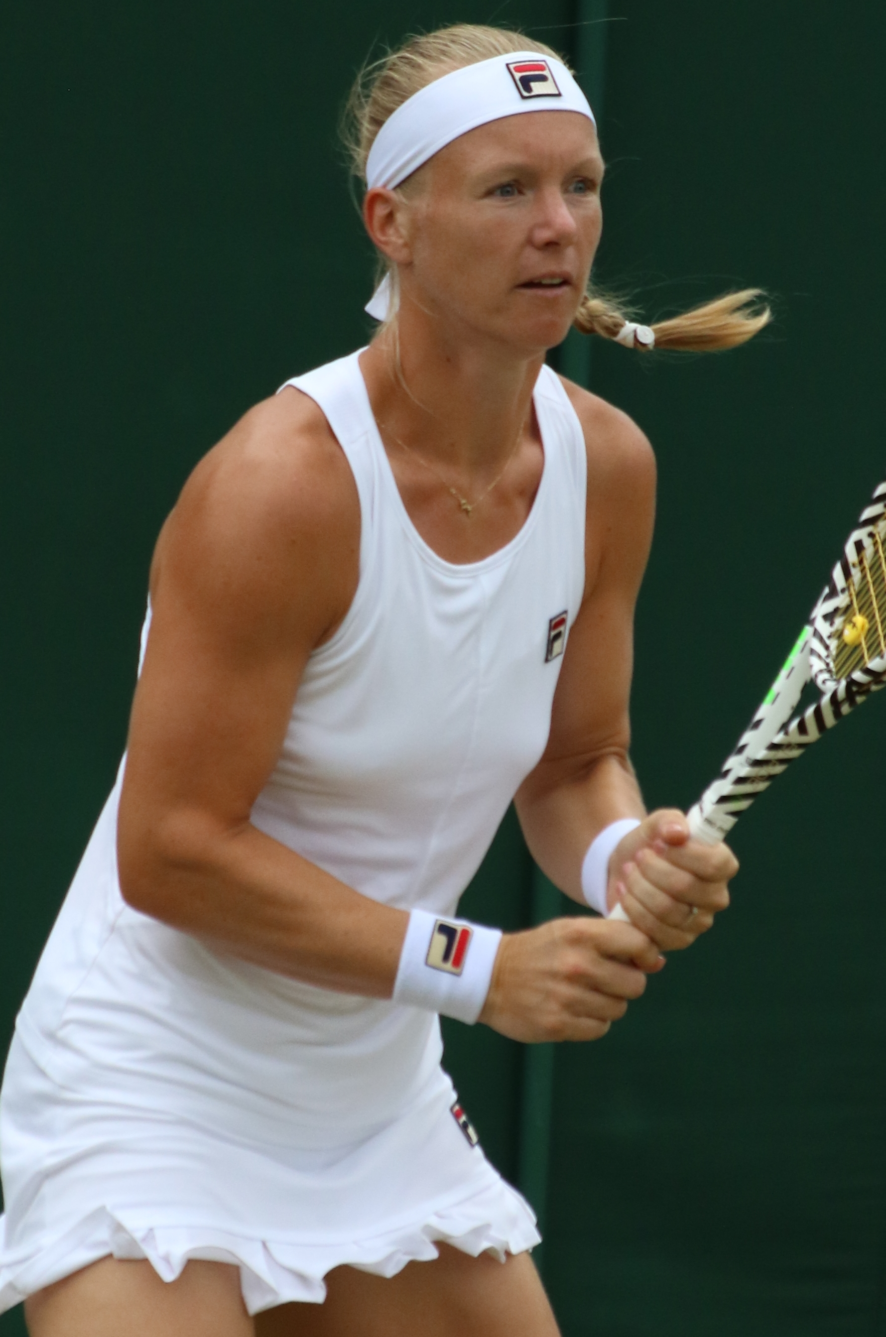 Bertens WM19 (12)